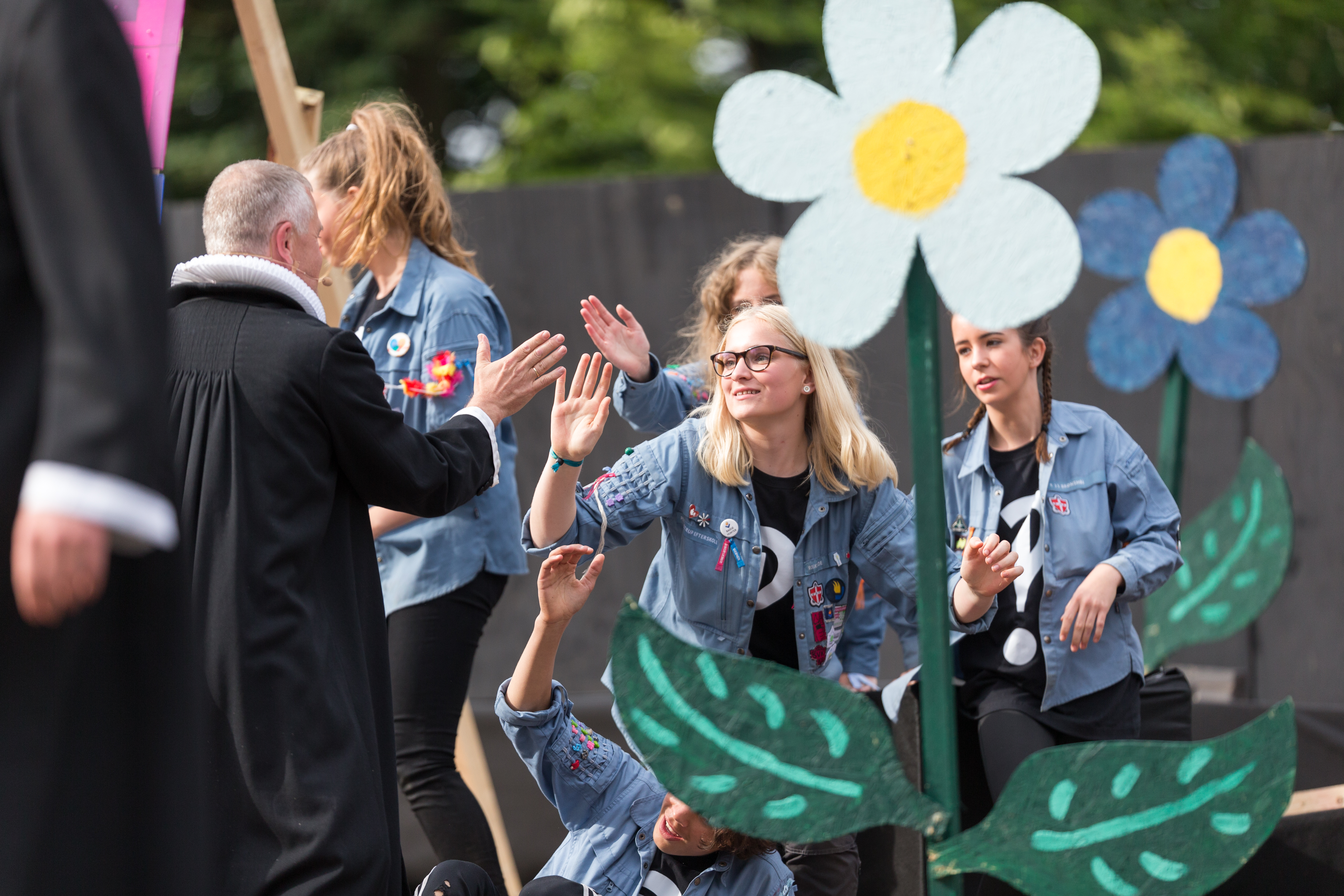 Fra gudstjeneste på FDF Landslejr 2016